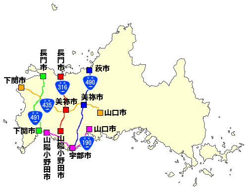 国道190号・国道316号・国道435号・国道490号・国道491号の位置図